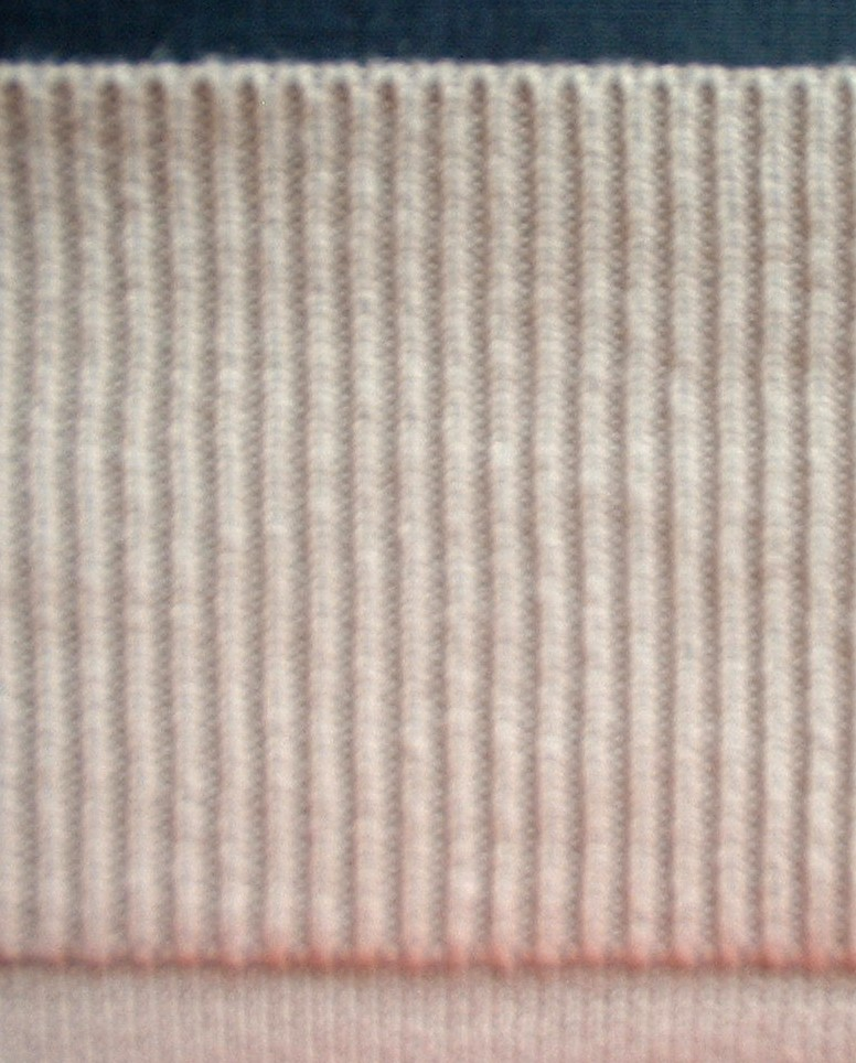 Bündchen aus Patentgestrick